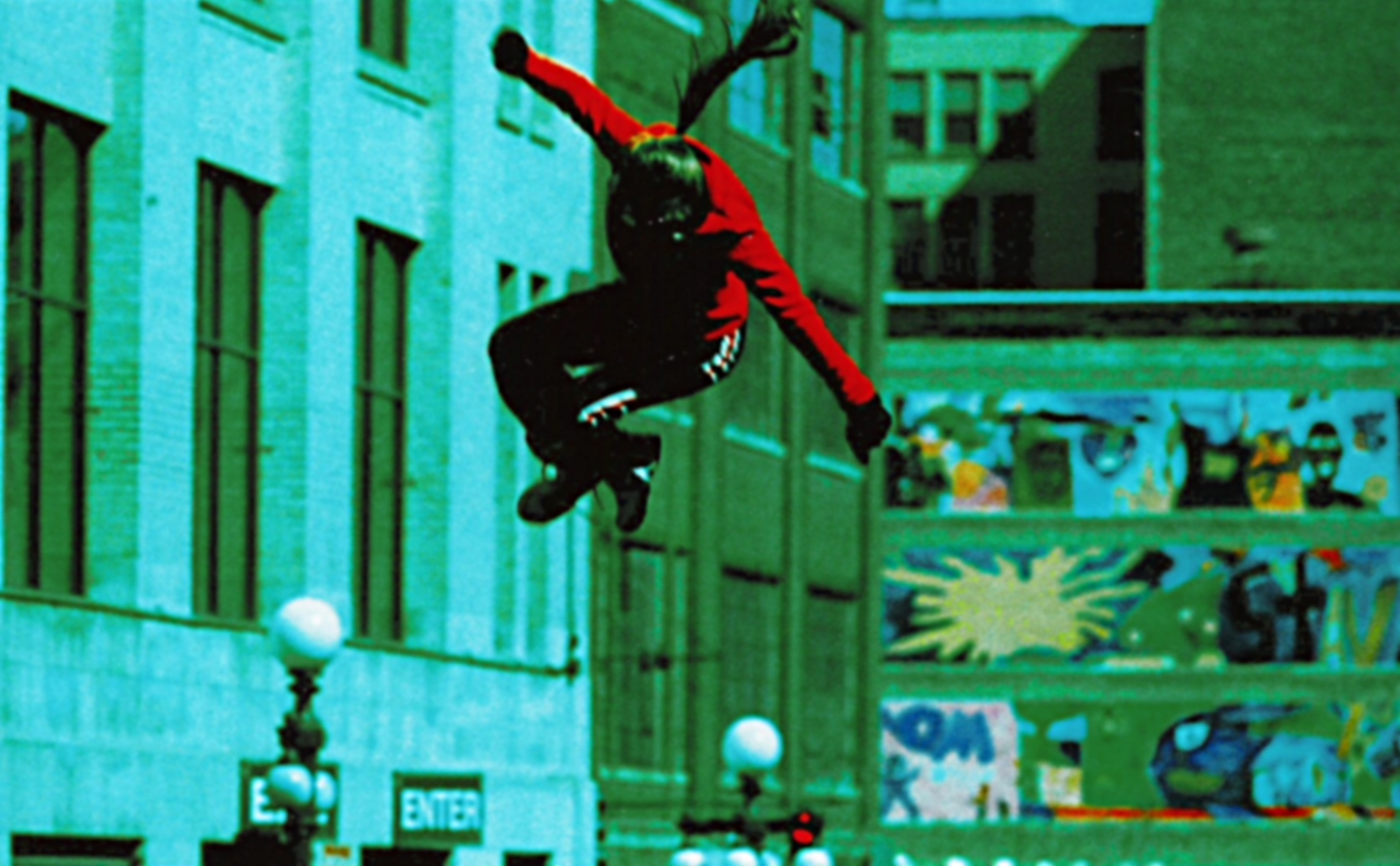 Saint Paul, Minnesota